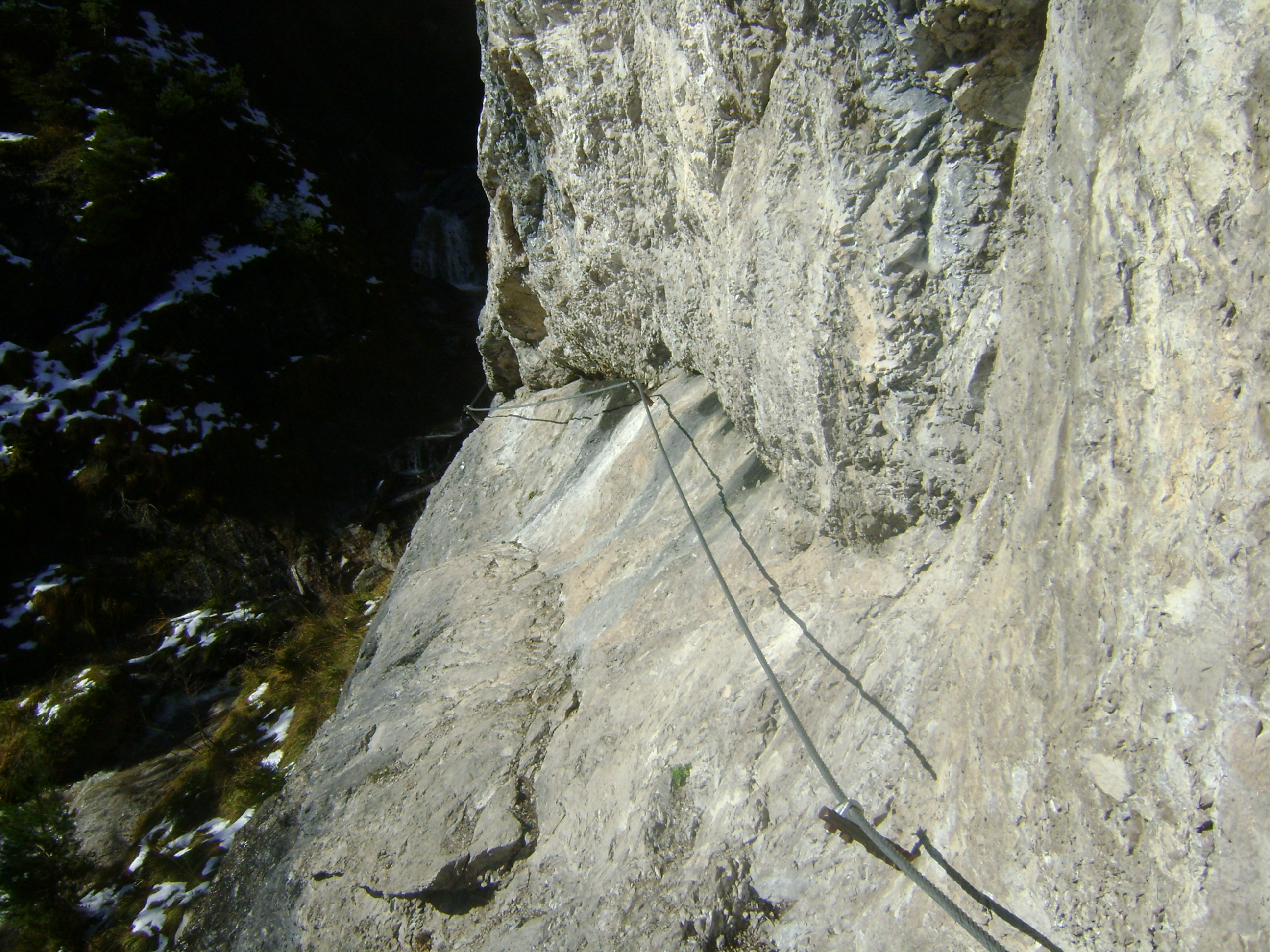 Mittelteil des Steiges